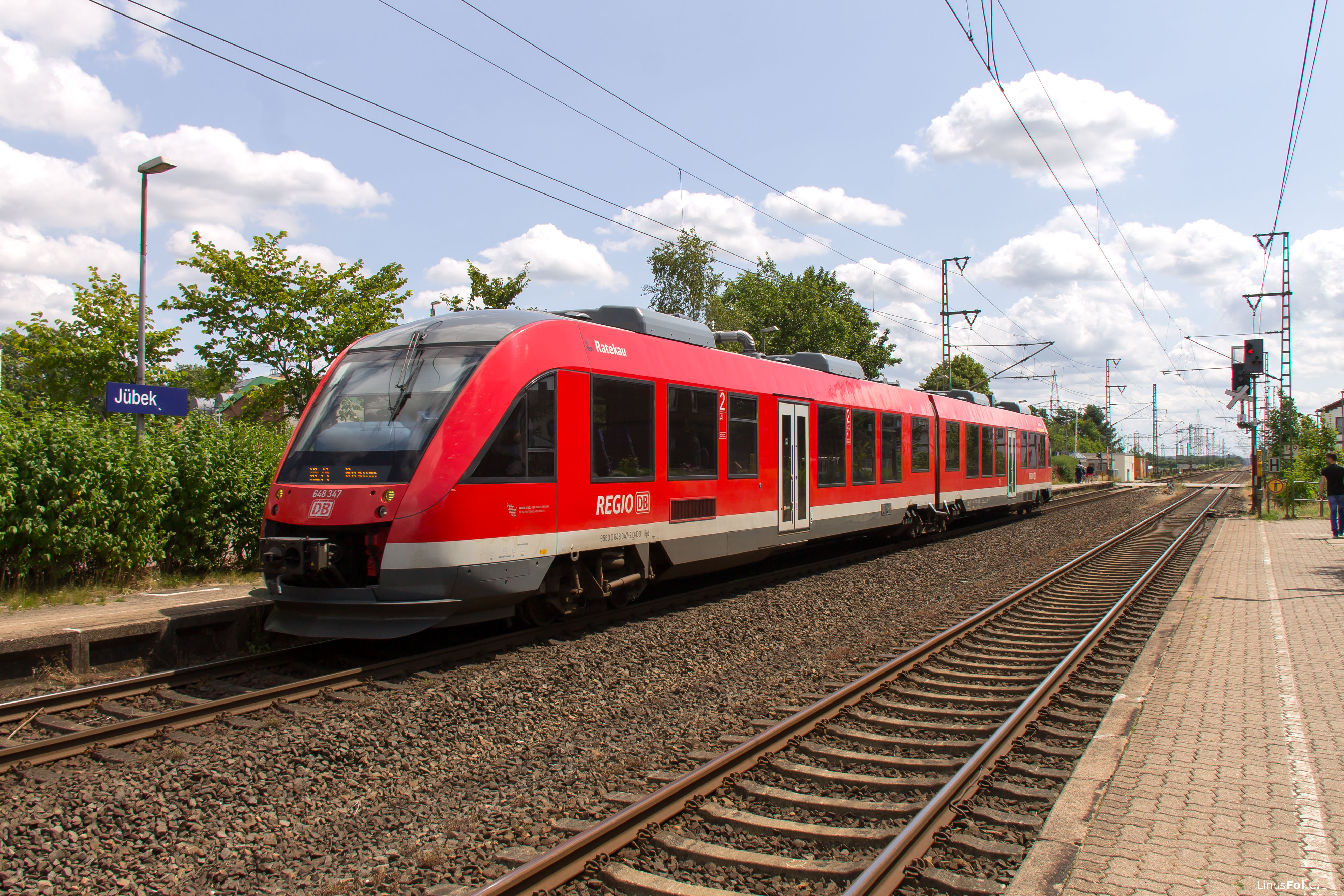 DB BR 648 (RE21214)im Bahnhof Jübek (Kiel Hbf ↔ Husum)